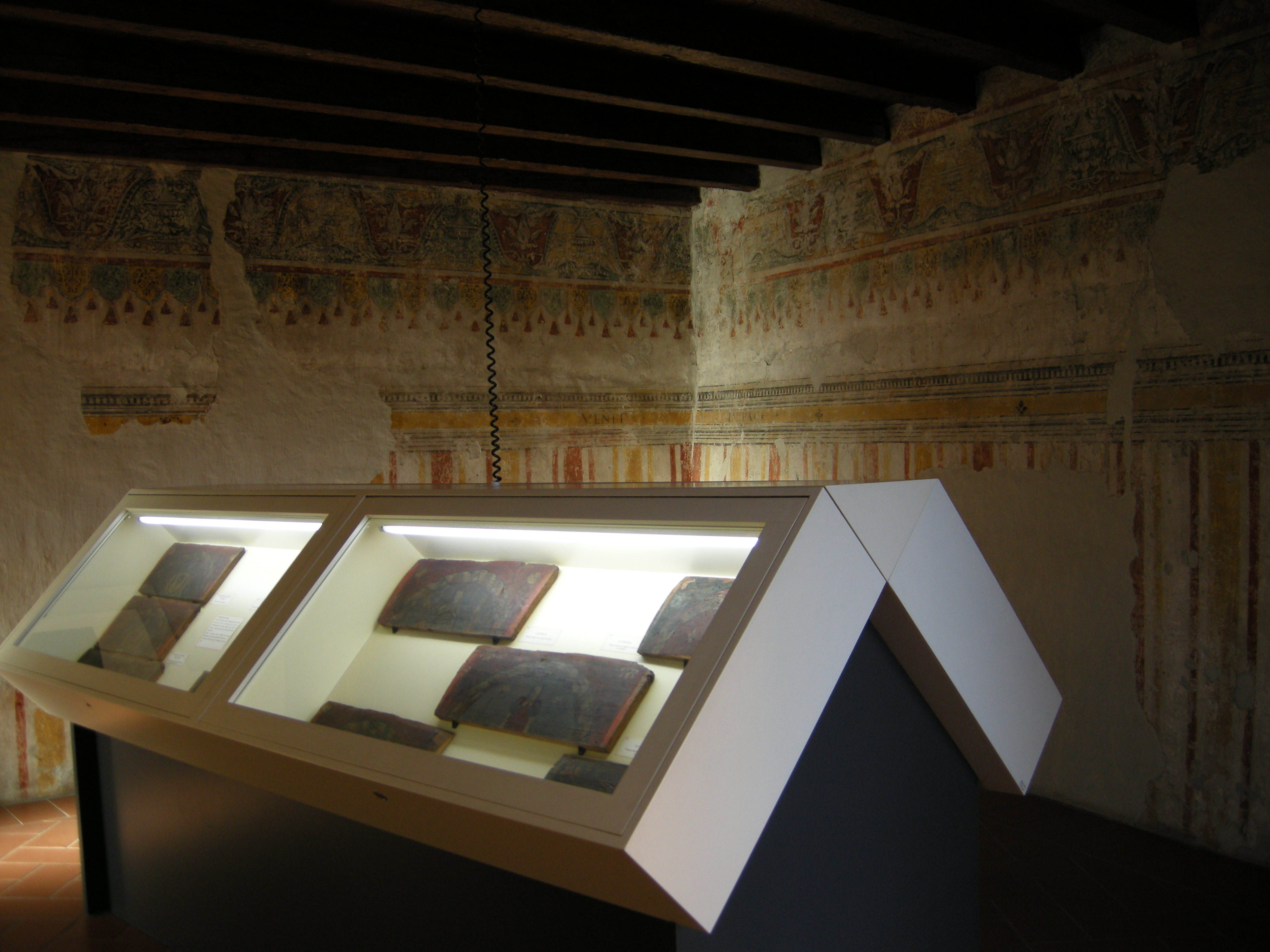 La sala dedicata ai ritrovamenti rinascimentali del palazzo stesso.